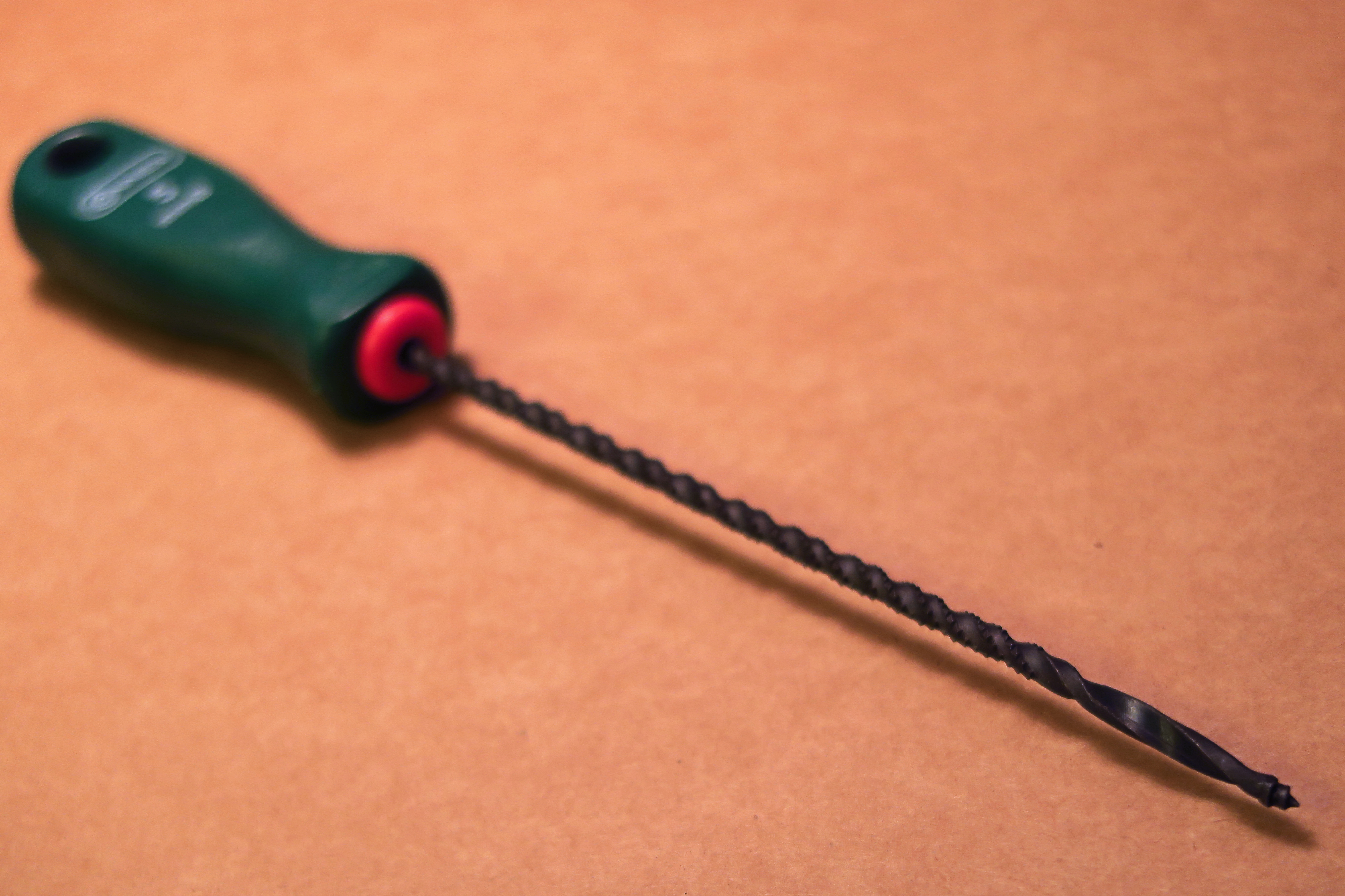 Handwerkzeug, ein Stichling bzw. eine Bohrsäge mit einem Durchmesser von 5mm, Hersteller: Connex